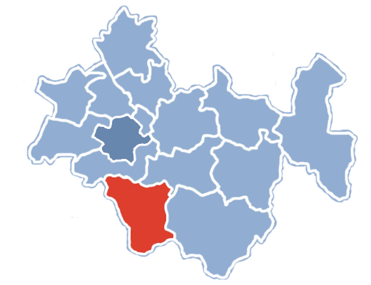 Położenie gminy Gidle na terenie powiatu radomszczańskiego.